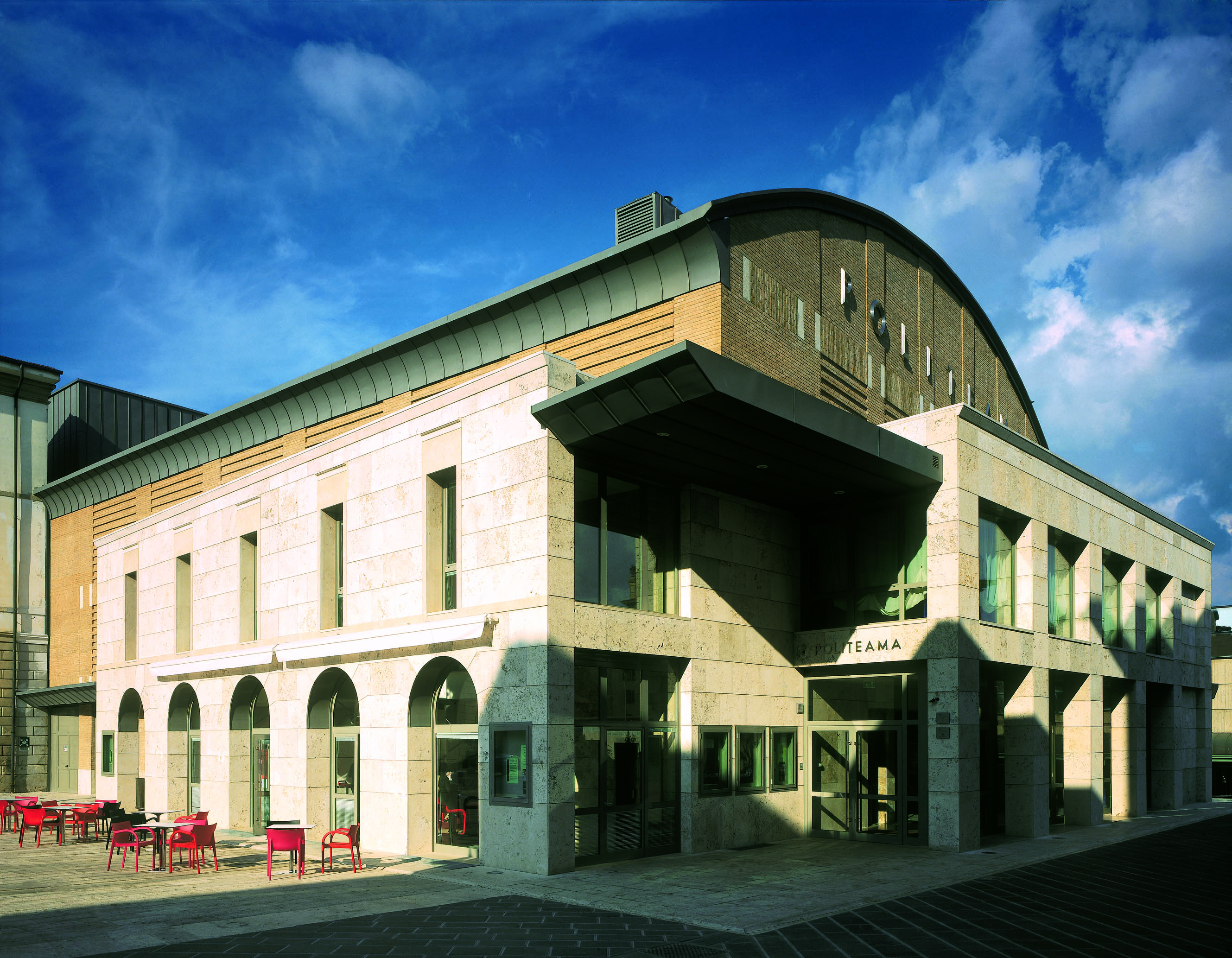 Teatro Politeama - Esterno